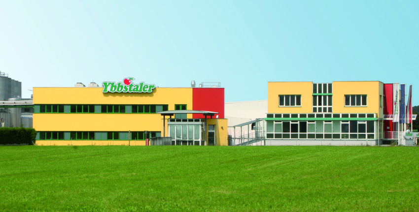 gebäude